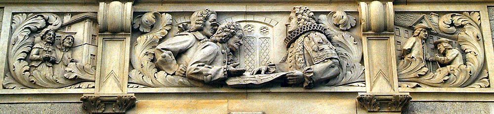 Der hannoversche Bürgermeister Christian Ulrich Grupen erläuterte 1774 dem Stadtrat die erste Erweiterung der Stadt durch die Aegidienneustadt; als Teil des halbplastischen Geschichts- oder auch "Bilderfrieses" am Neuen Rathaus in Hannover verewigte der Bildhauer Peter Schumacher das Thema ...